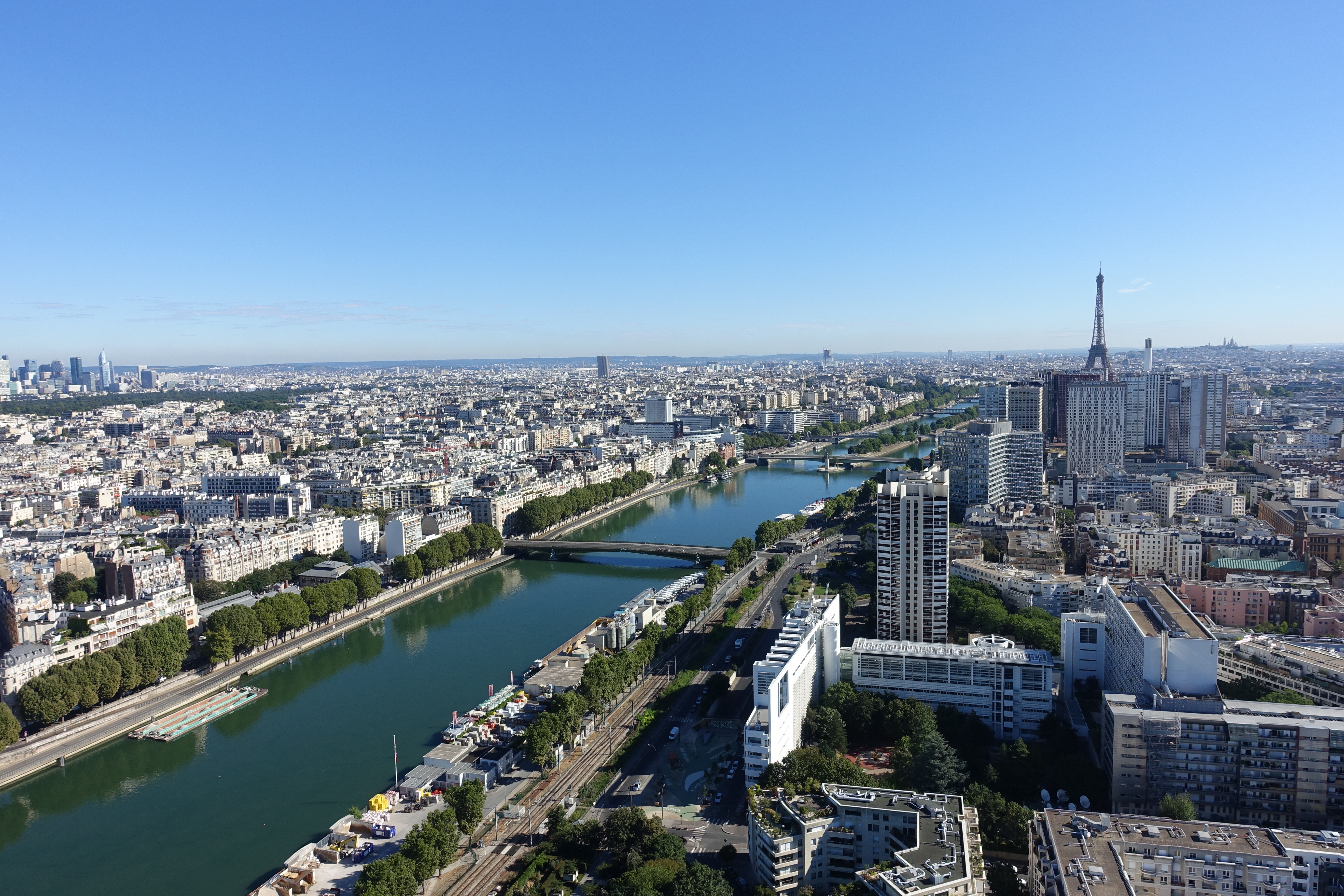 Ballon de Paris @ Parc André Citroën @ Paris